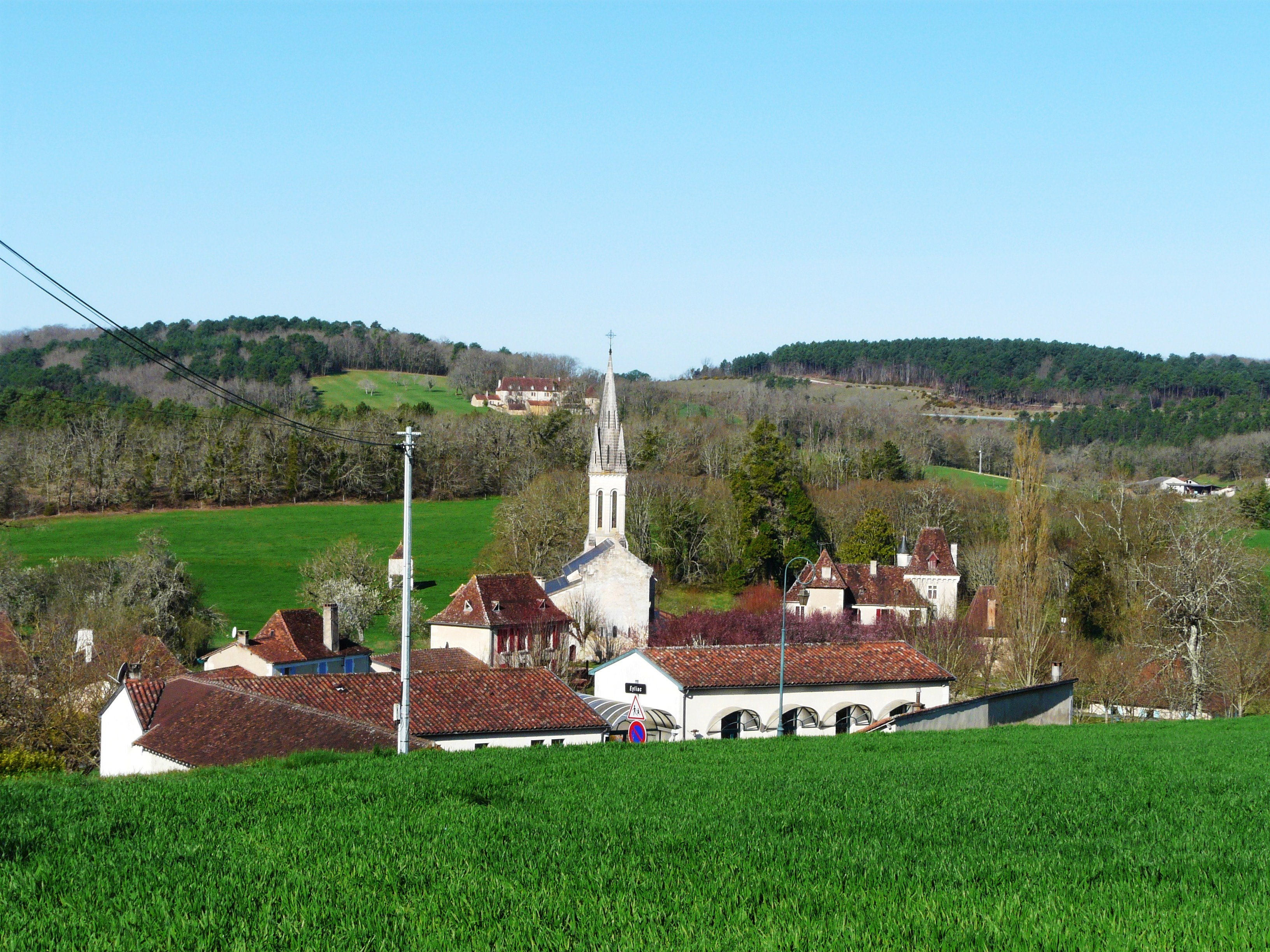 Le village d'Eyliac vu depuis l'est, Dordogne, France. À droite de l'église, le château d'Eyliac. Au fond, sur la gauche du clocher, le château de la Chalupie. Au fond, à droite la tranchée de l'autoroute A89.